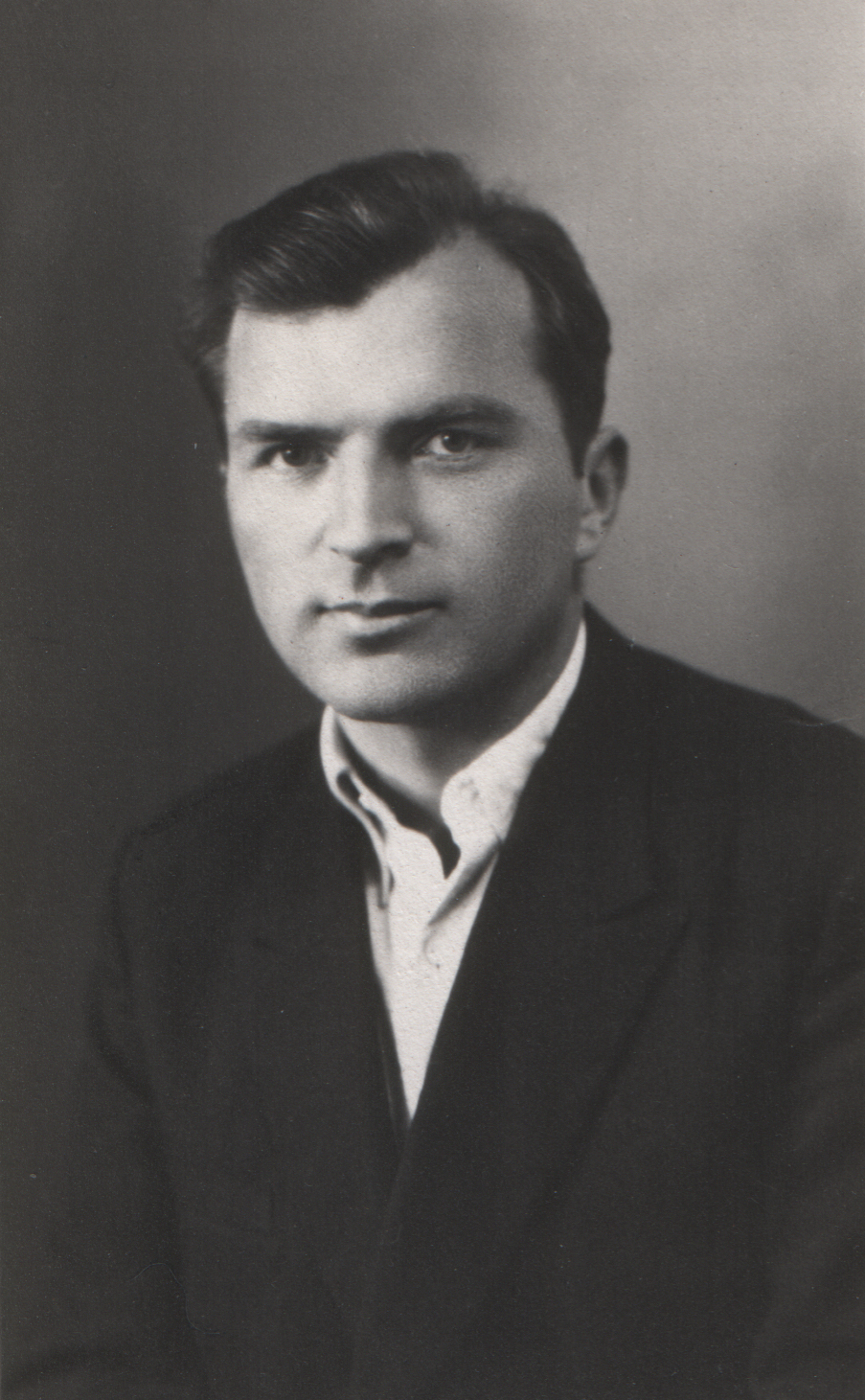 Скенирана фотографија из породичне архиве.